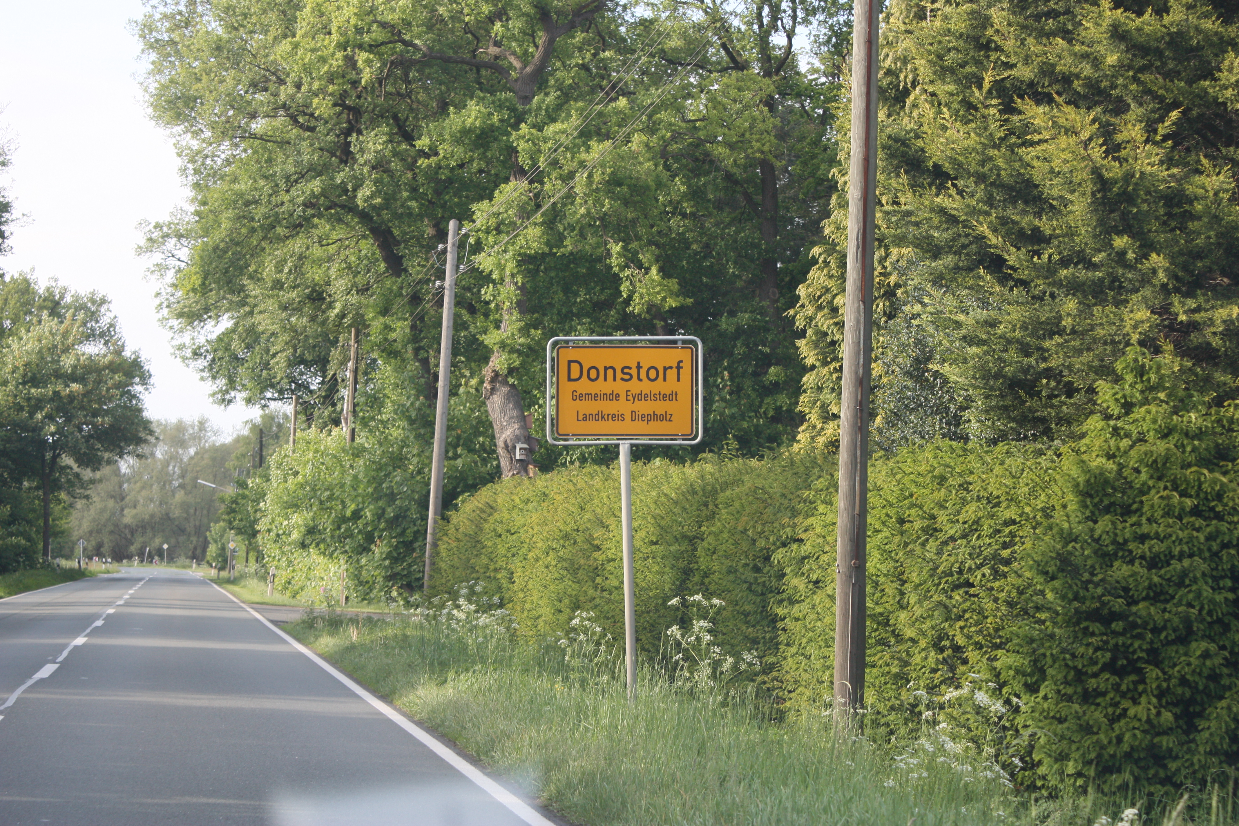 Eydelstedt